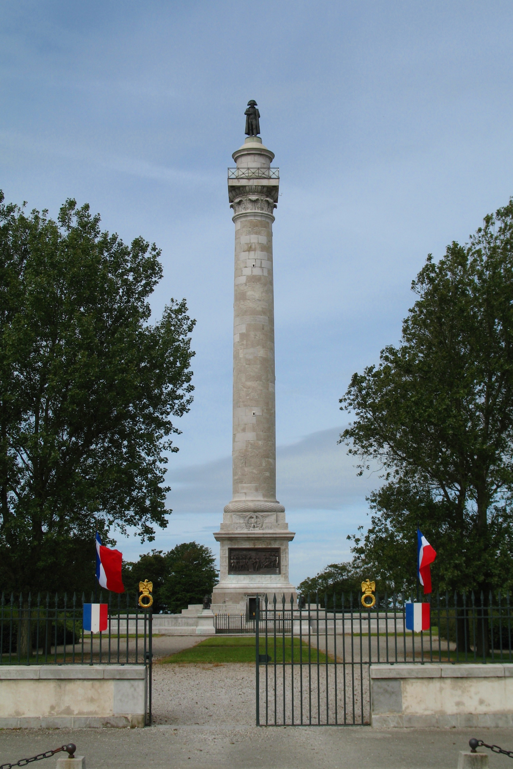 Boulogne (département du Pas-de-Calais, France): Colonne de la Grande Armée